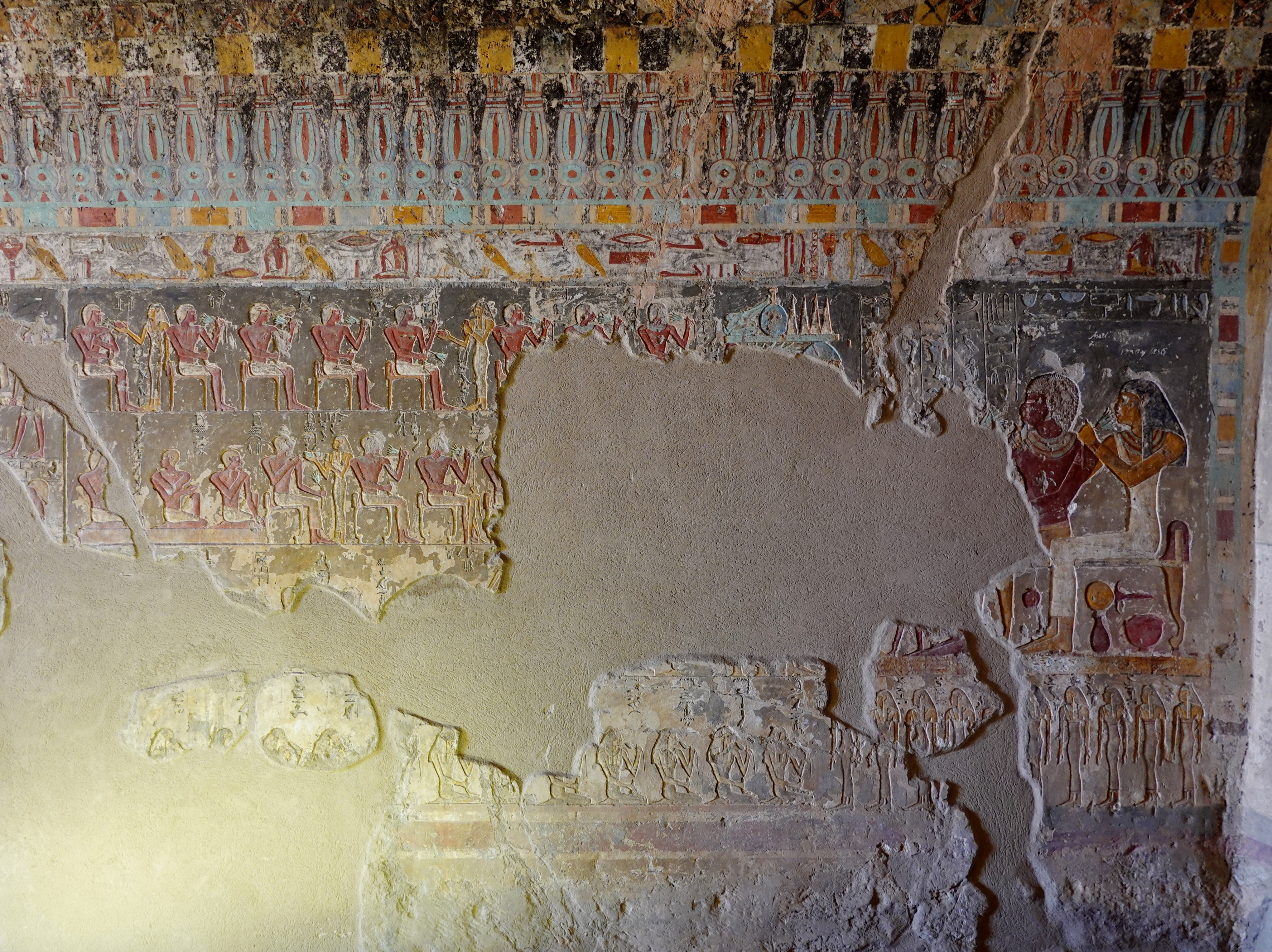 Felsengrab des Renni unter den Felsengräbern des altägyptischen Necheb bei el-Kab, Ägypten